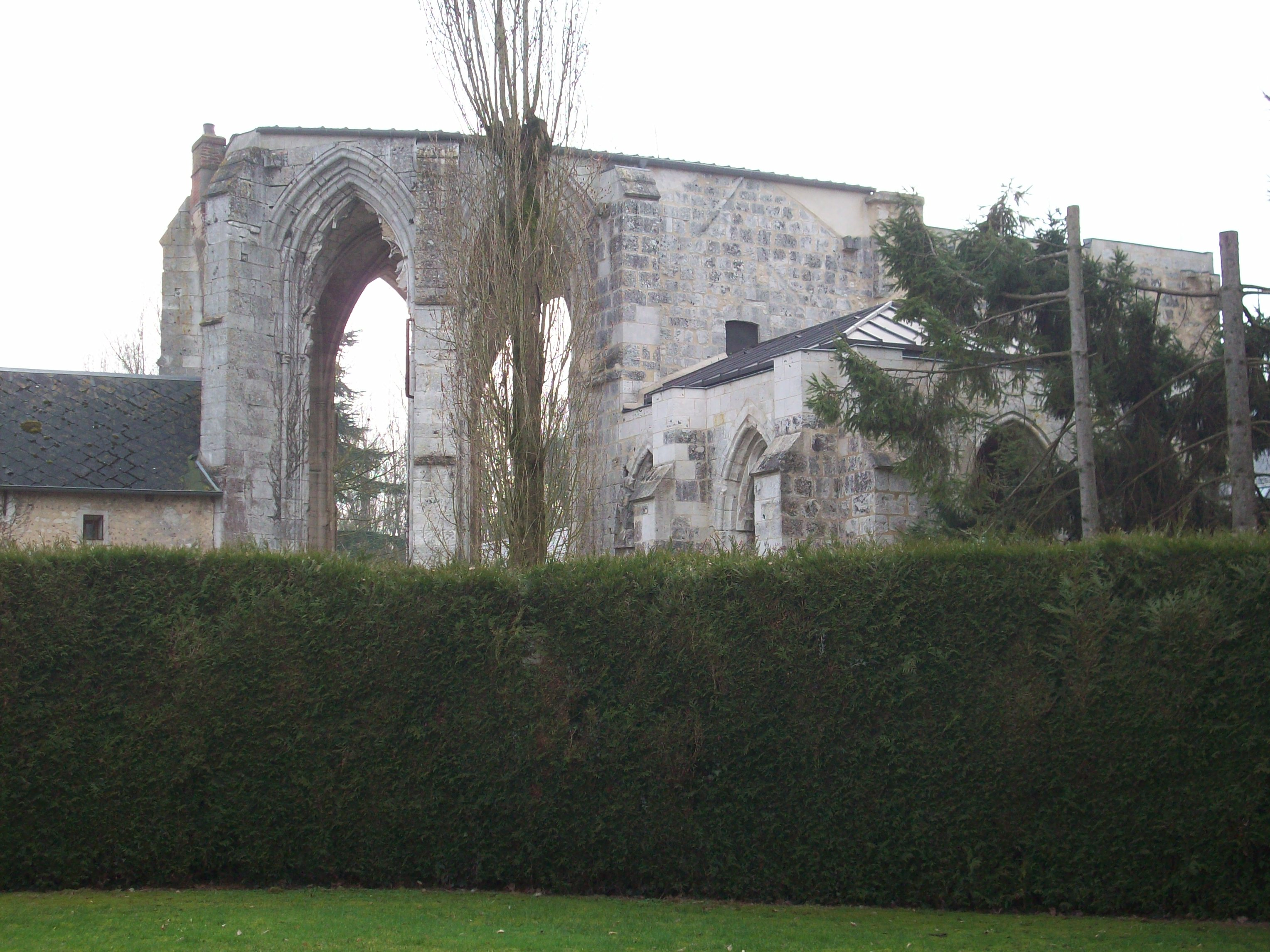 Ruines de l'église prieurale.